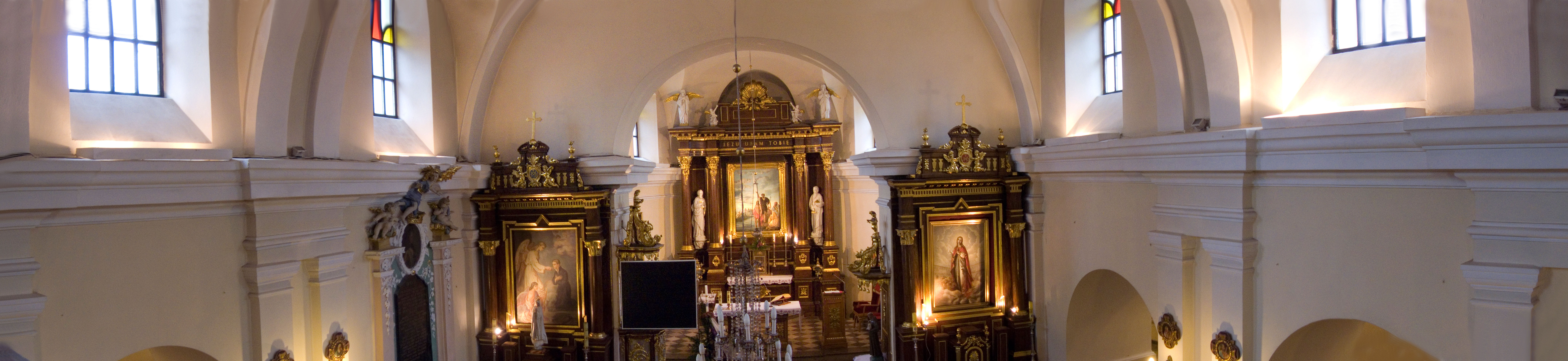 Panorama wnętrza Kościoła Parafialnego w Nałęczowie